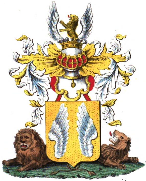 Armoiries de la famille de Gruben